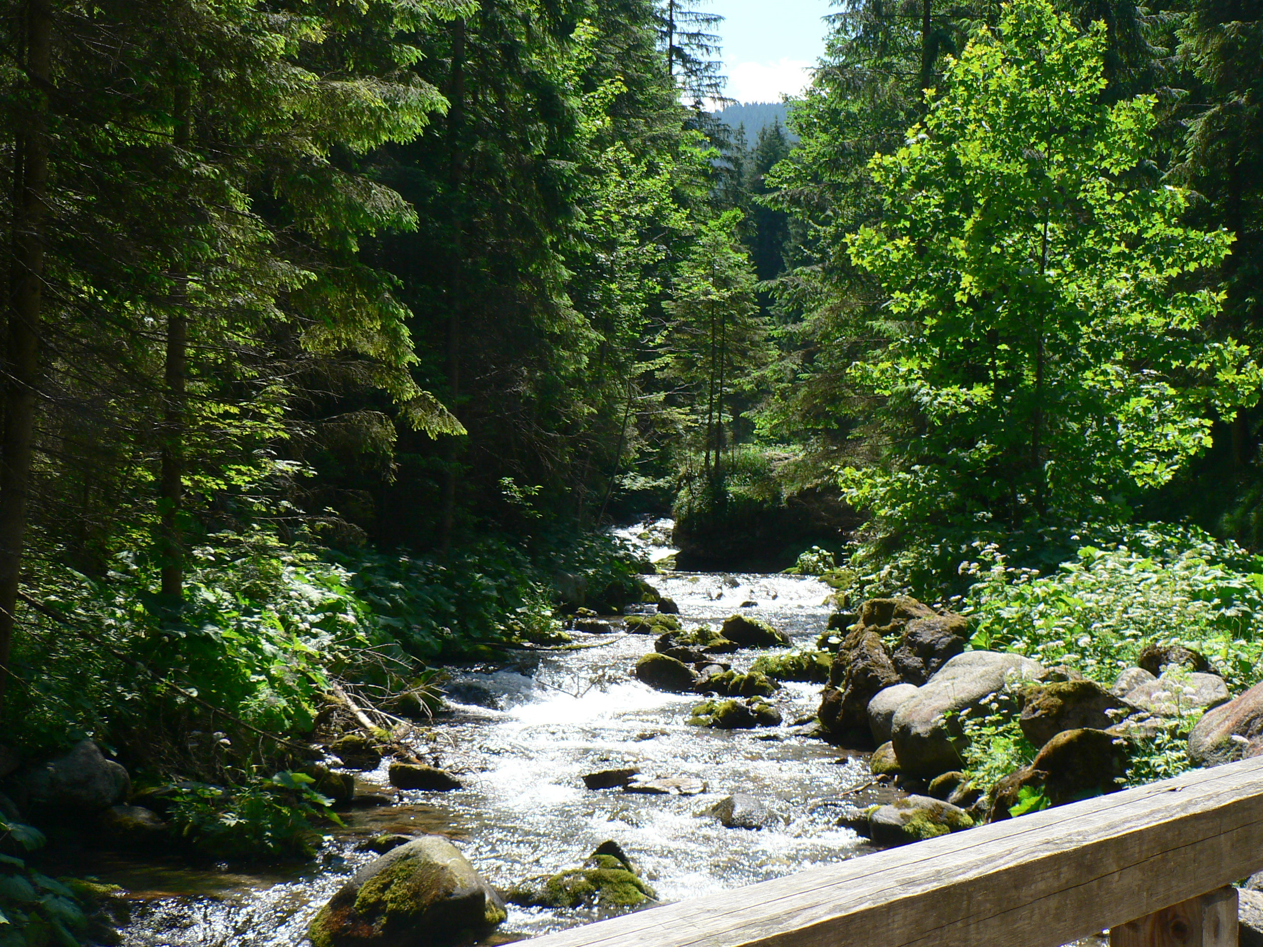 Potok Olczyski w Dolinie Olczyskiej w Tatrach Zachodnich